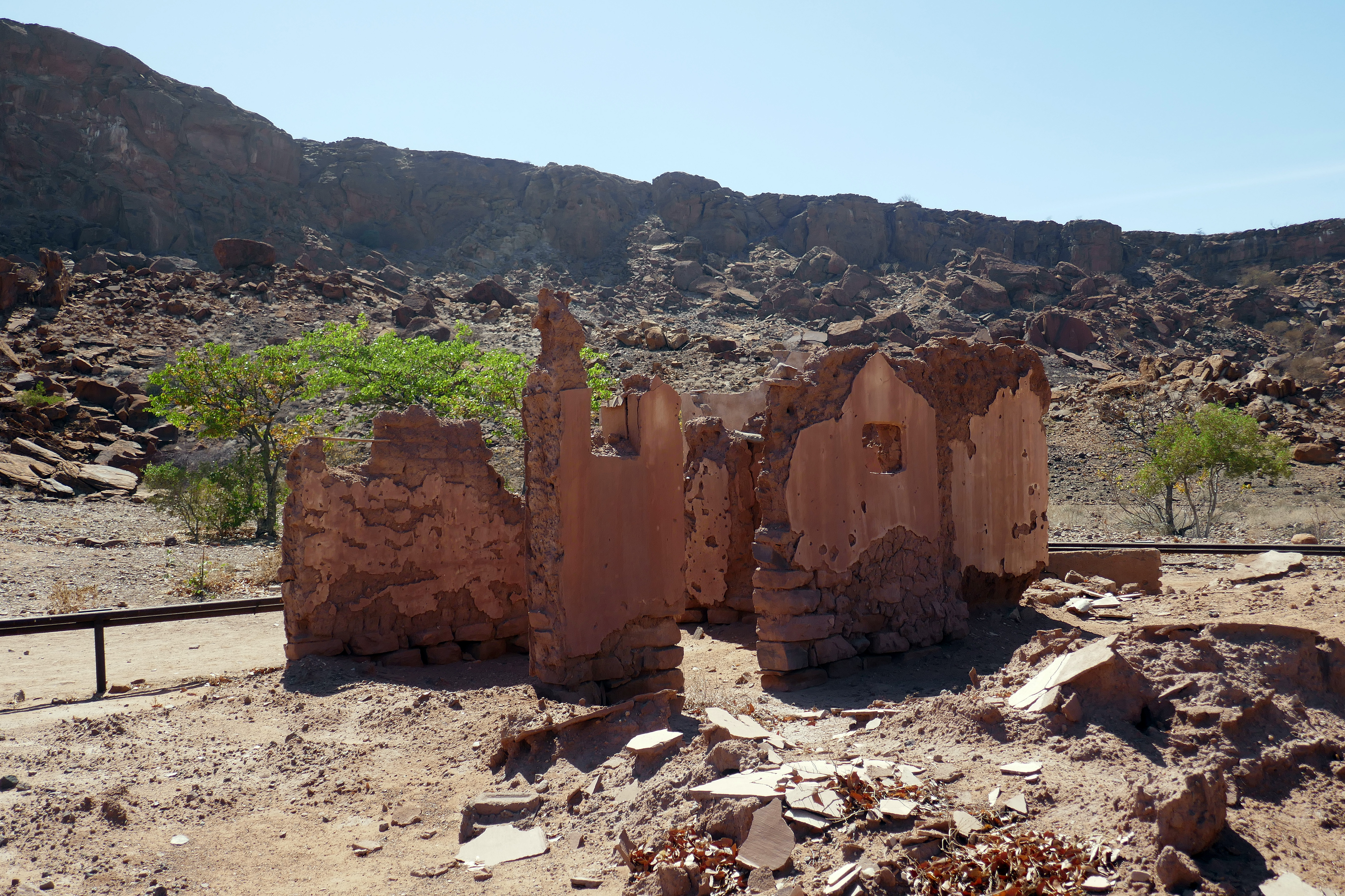 Twyfelfontein (Namibie). Vestiges de la maison de David Levin, le fermier qui s'installa le premier sur le site, qui lui doit son nom (Twyfelfontein = "source incertaine").